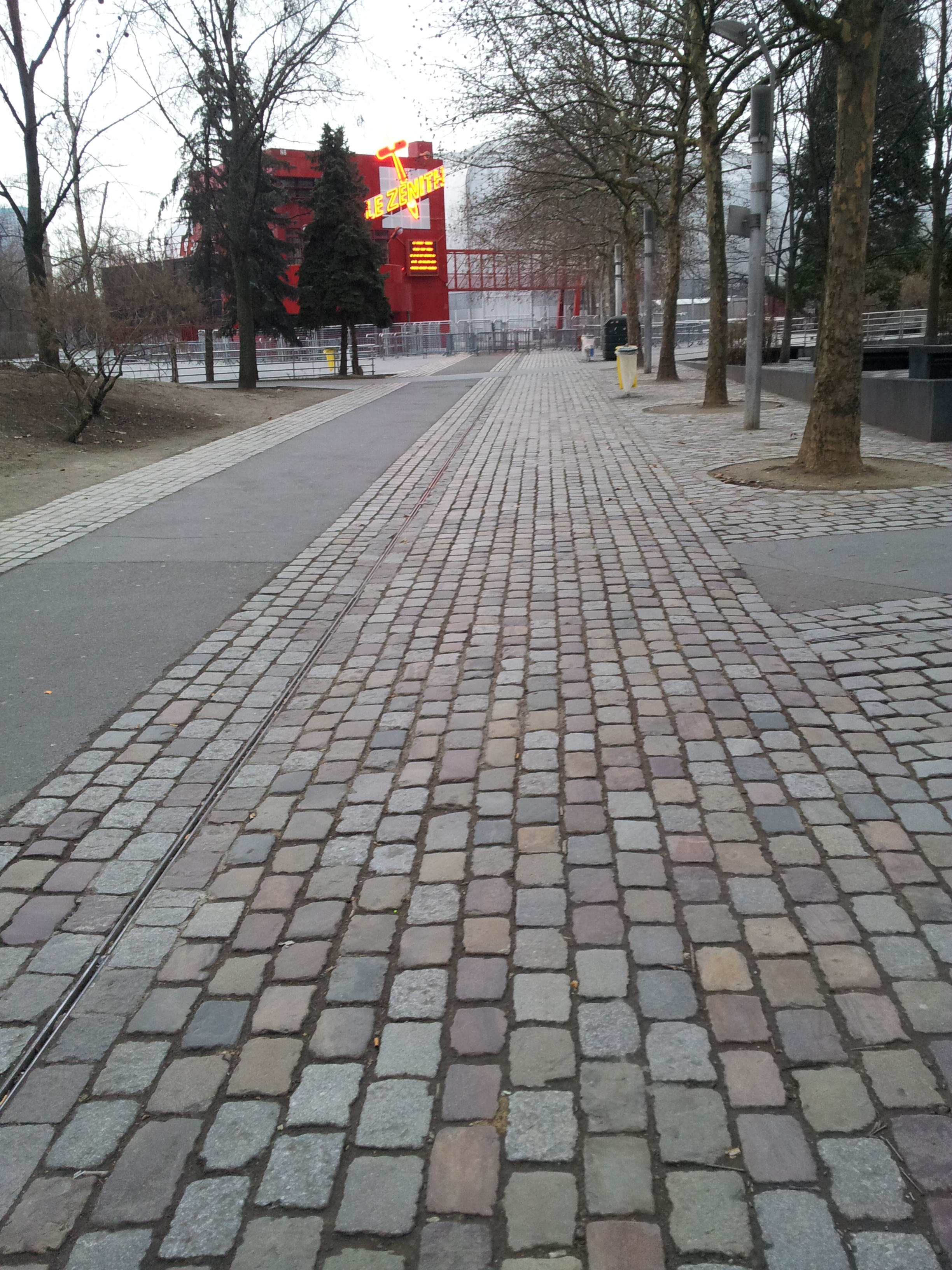 Une allée qui vous dirige vers la salle de spectacle Le Zenith dans le parc de la Villette du 19e arrondissement de Paris en France. Au fond folie R6 par Bernard Tschumi transformée en billetterie pour Le Zénith.